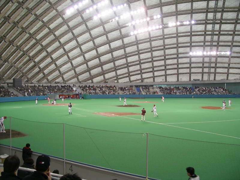 2006年マスターズリーグ（札幌アンビシャス対名古屋８０デイザーズ）